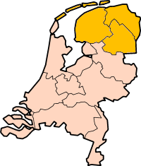 Locatiekaart van Noord-Nederland.